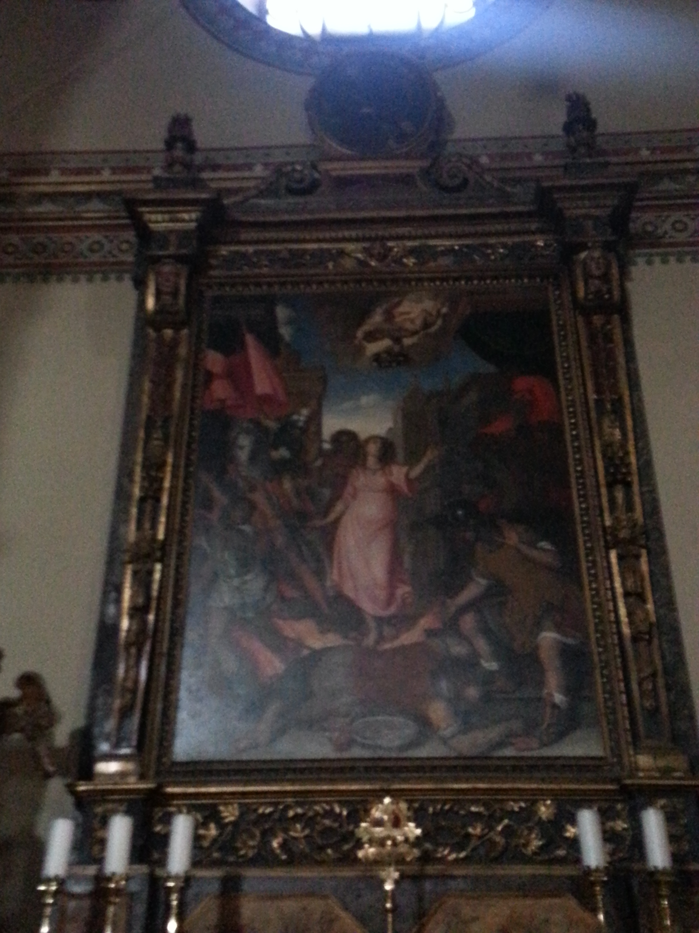 Martirio di Santa Lucia - Marco Richiedei - Chiesa del Paradiso